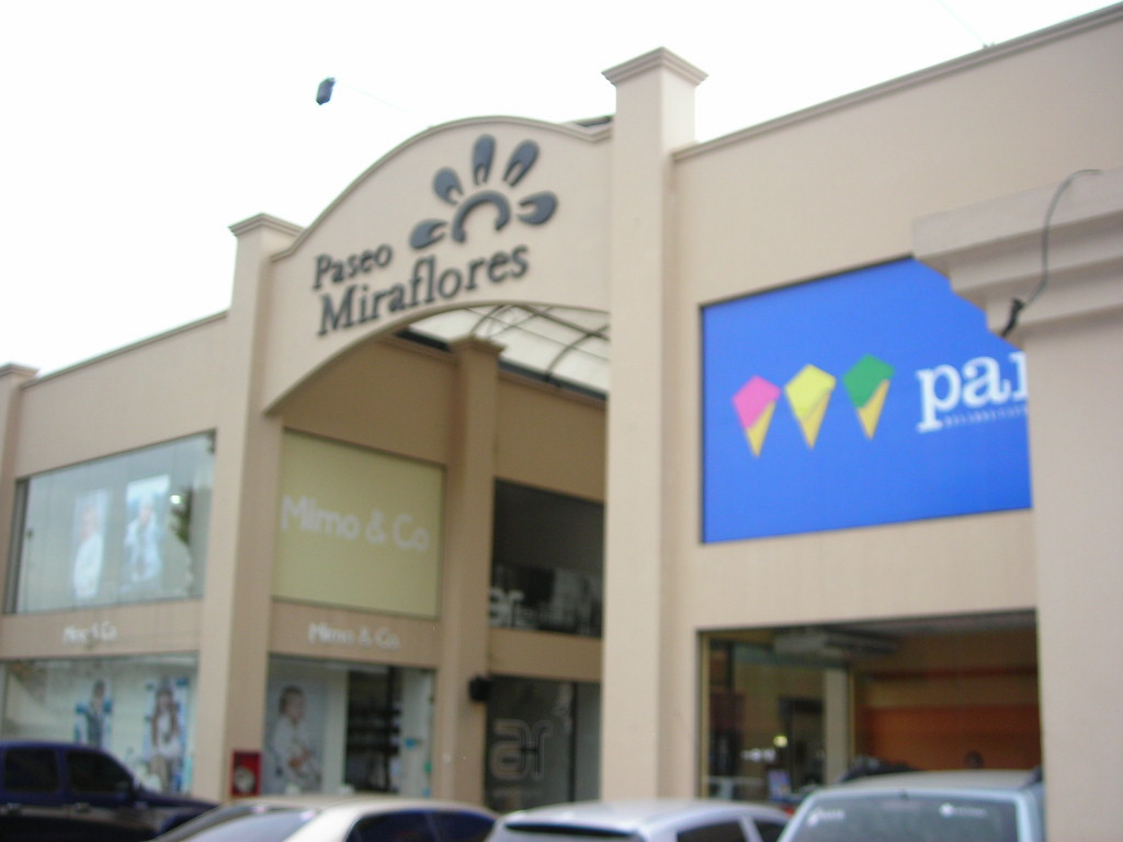 Paseo Miraflores, Asunción, Paraguay